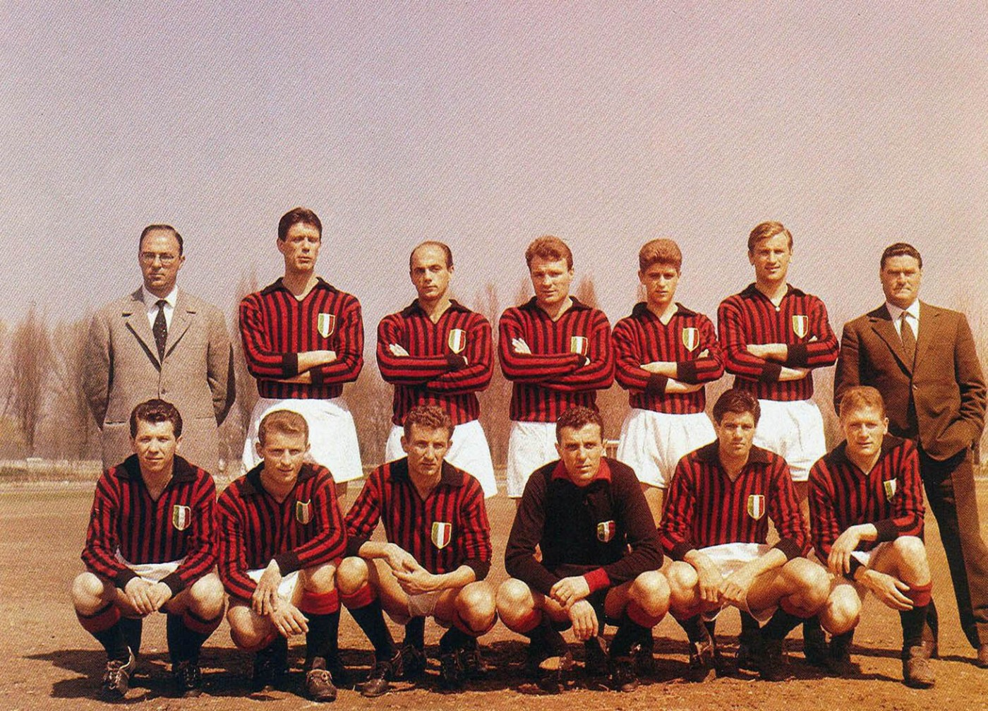 Foto di rito per il Milan al termine della stagione 1961-62, culminata con la vittoria del campionato italiano di Serie A.